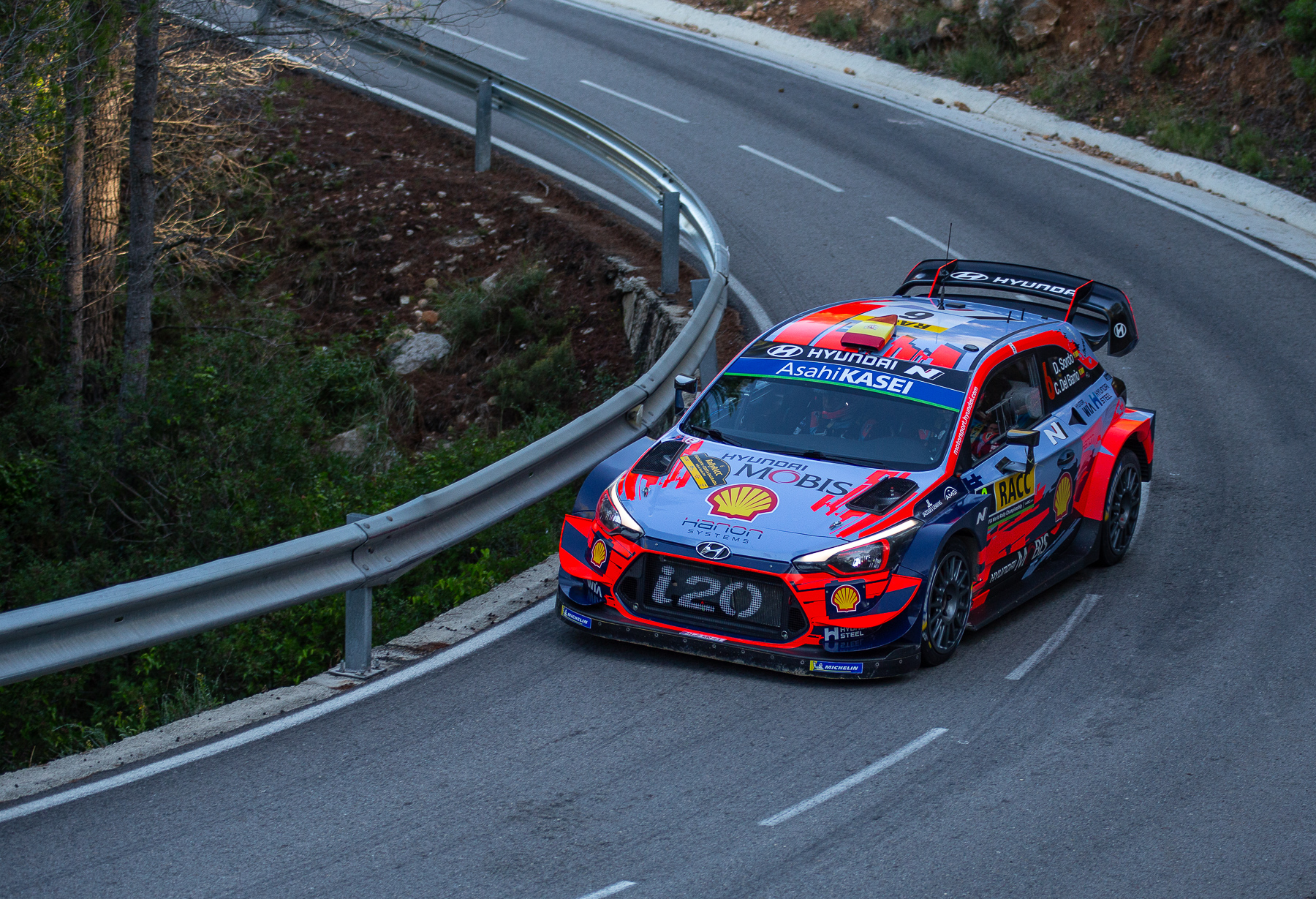 Rajd Hiszpanii 2019 - Sordo Dani